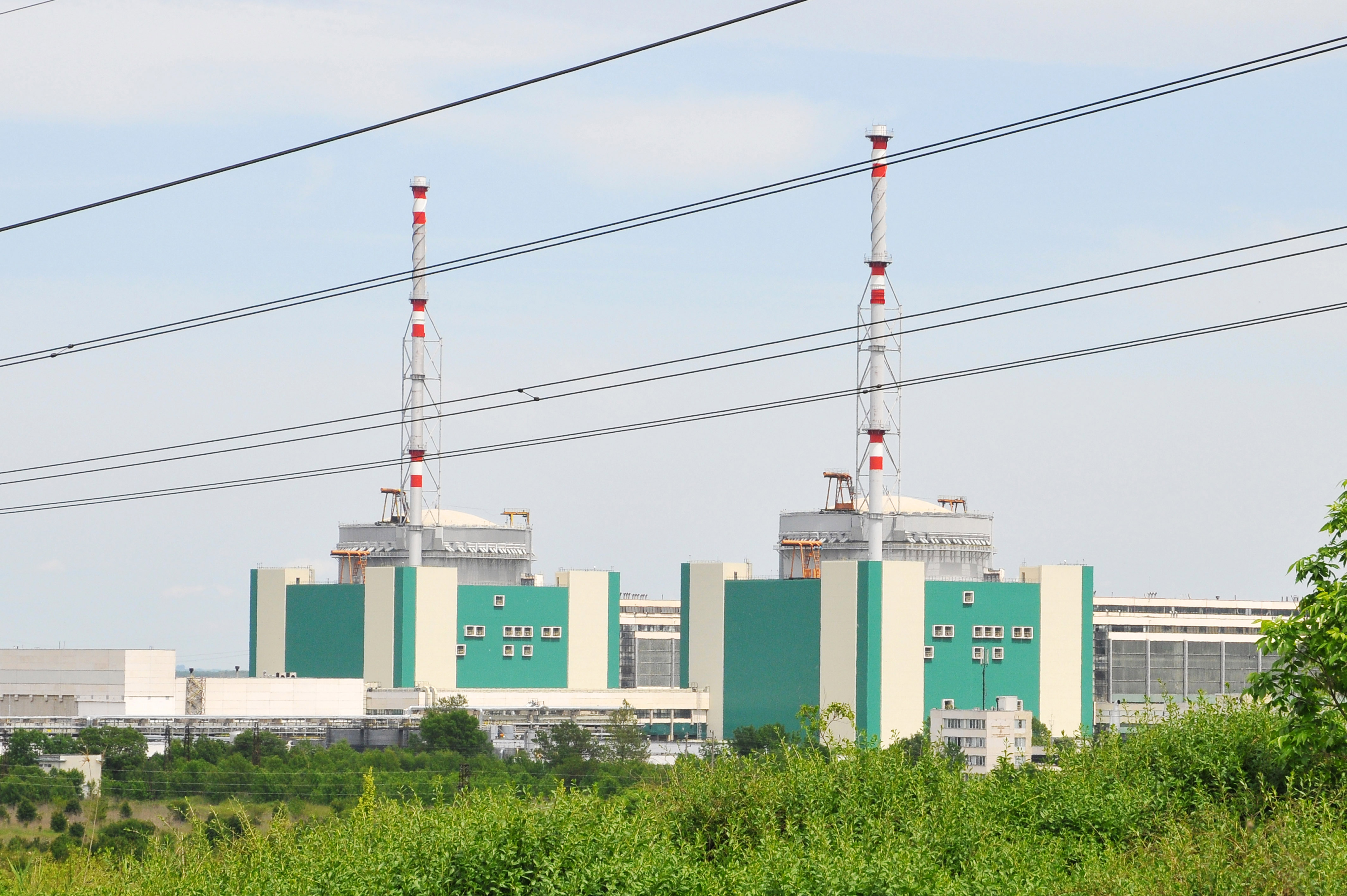 Първата атомна електроцентрала в България и на Балканския полуостров.